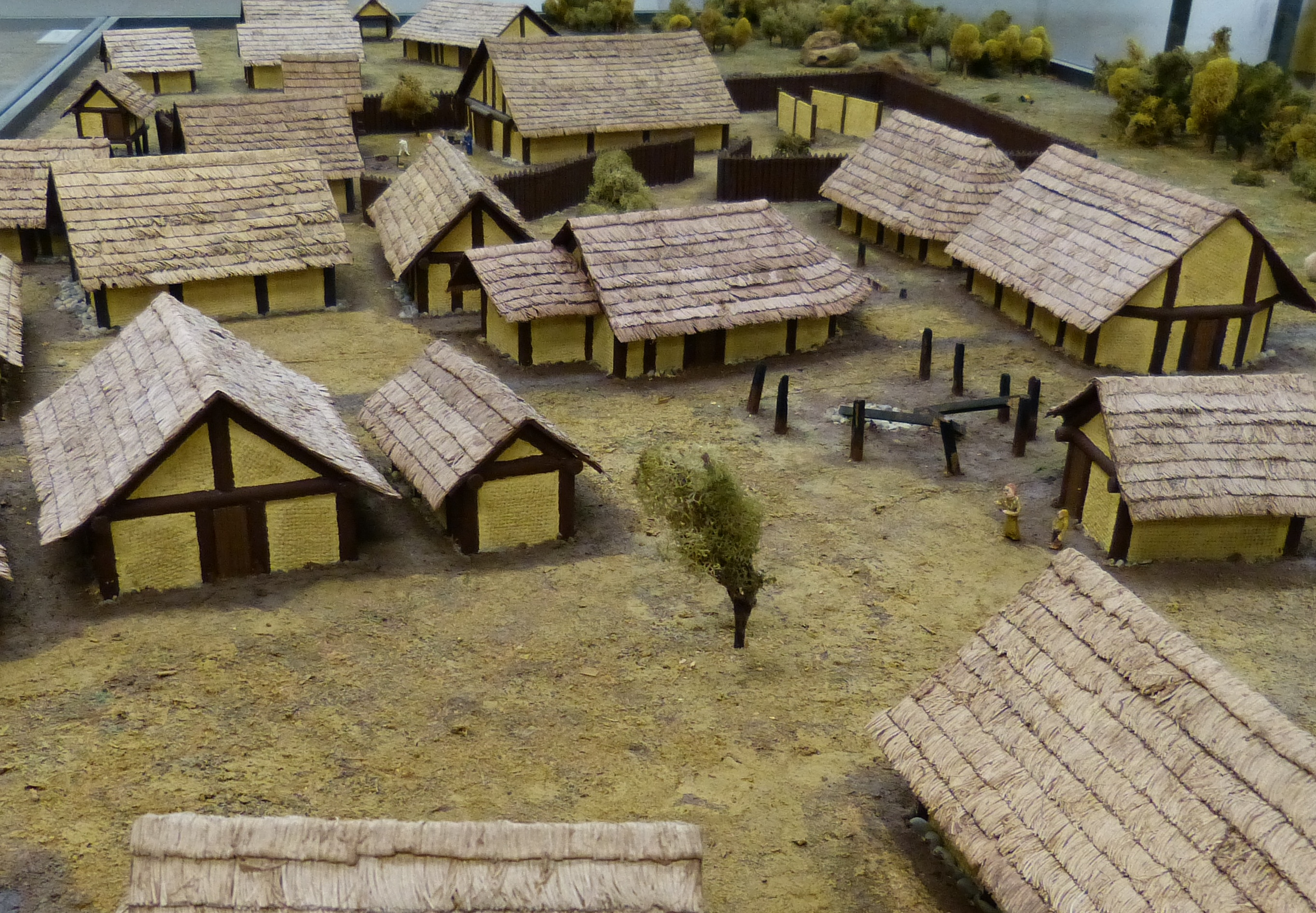 Archäologisches Museum Königsbrunn, Modell einer hallstattzeitlichen Siedlung.